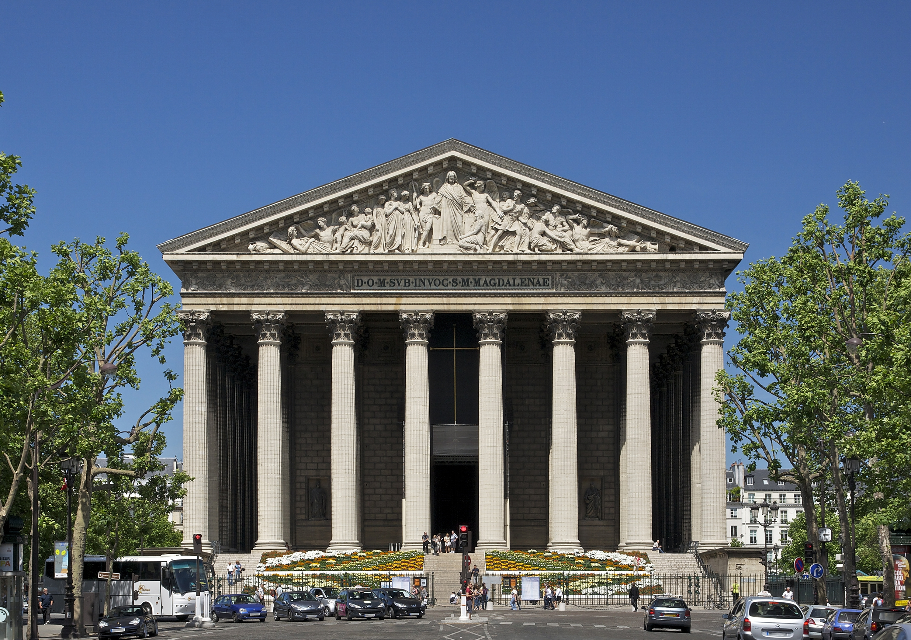 Façade de l'église de la Madeleine à Paris.